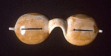 Eskimo snowgoggles.